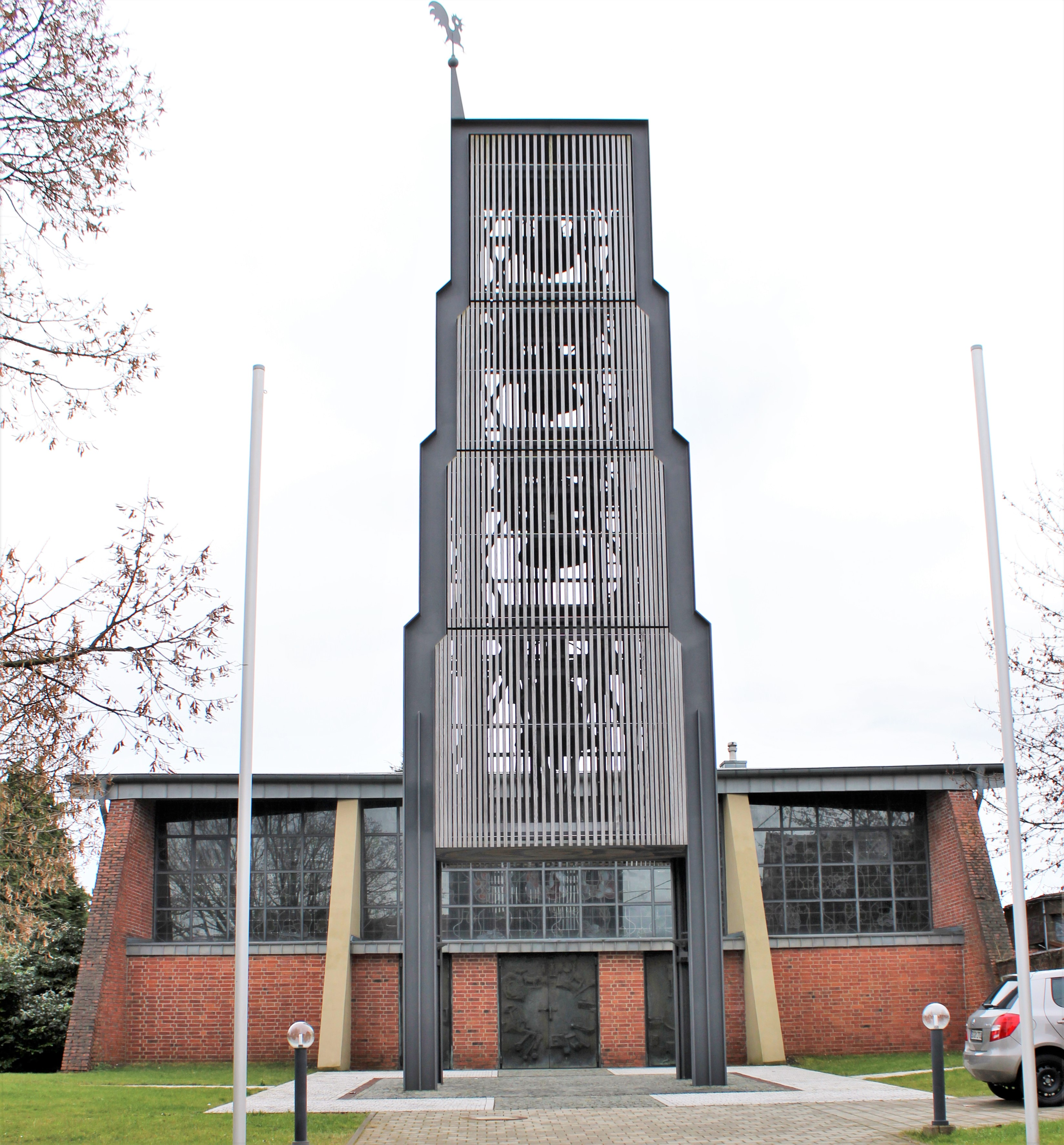 Die katholische Kirche St. Hildegard in Neuweiler, einem Stadtteil von Sulzbach (Saar), Regionalverband Saarbrücken, Saarland